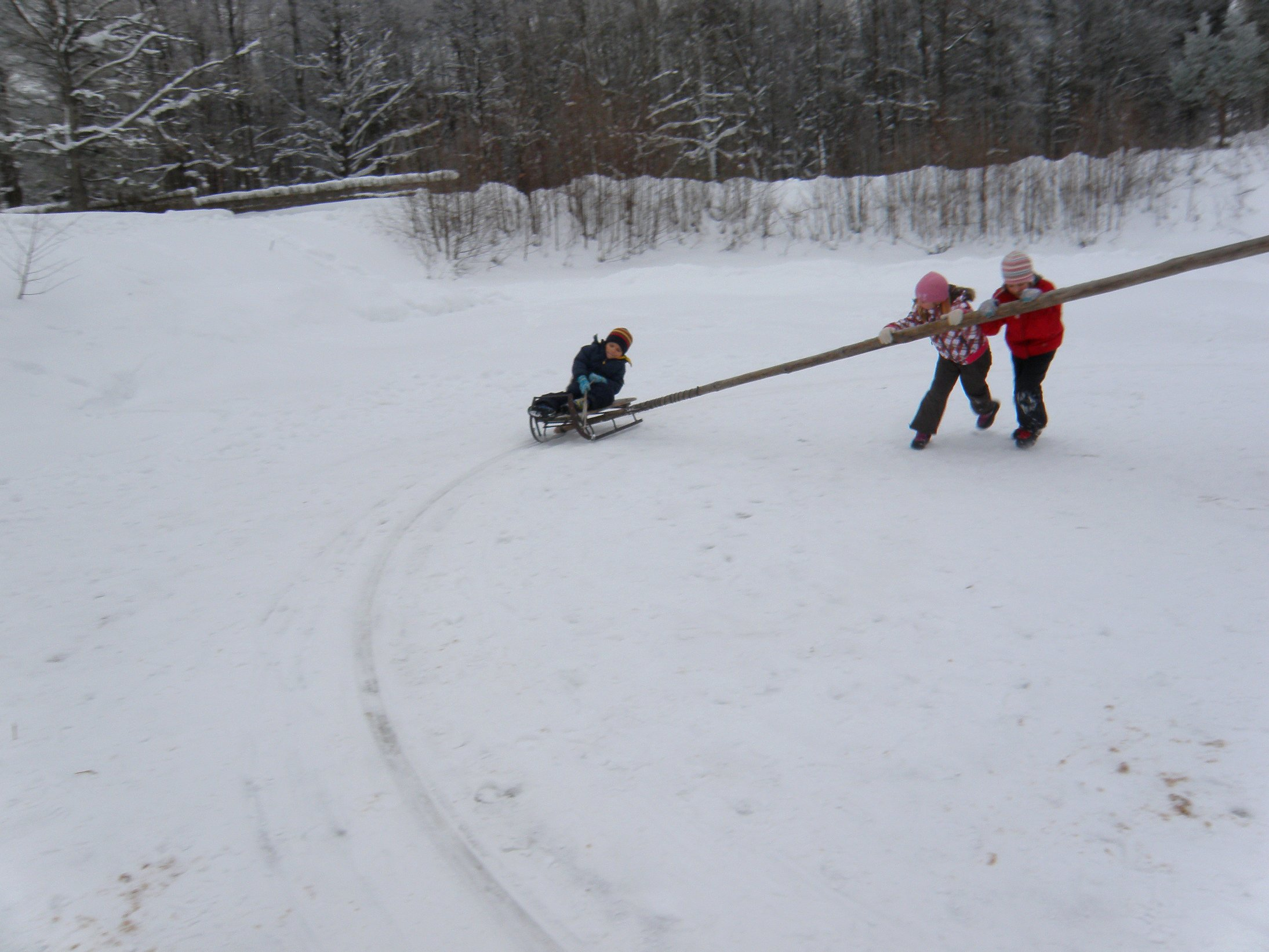 Jääkarussell Eesti Vabaõhumuuseumis